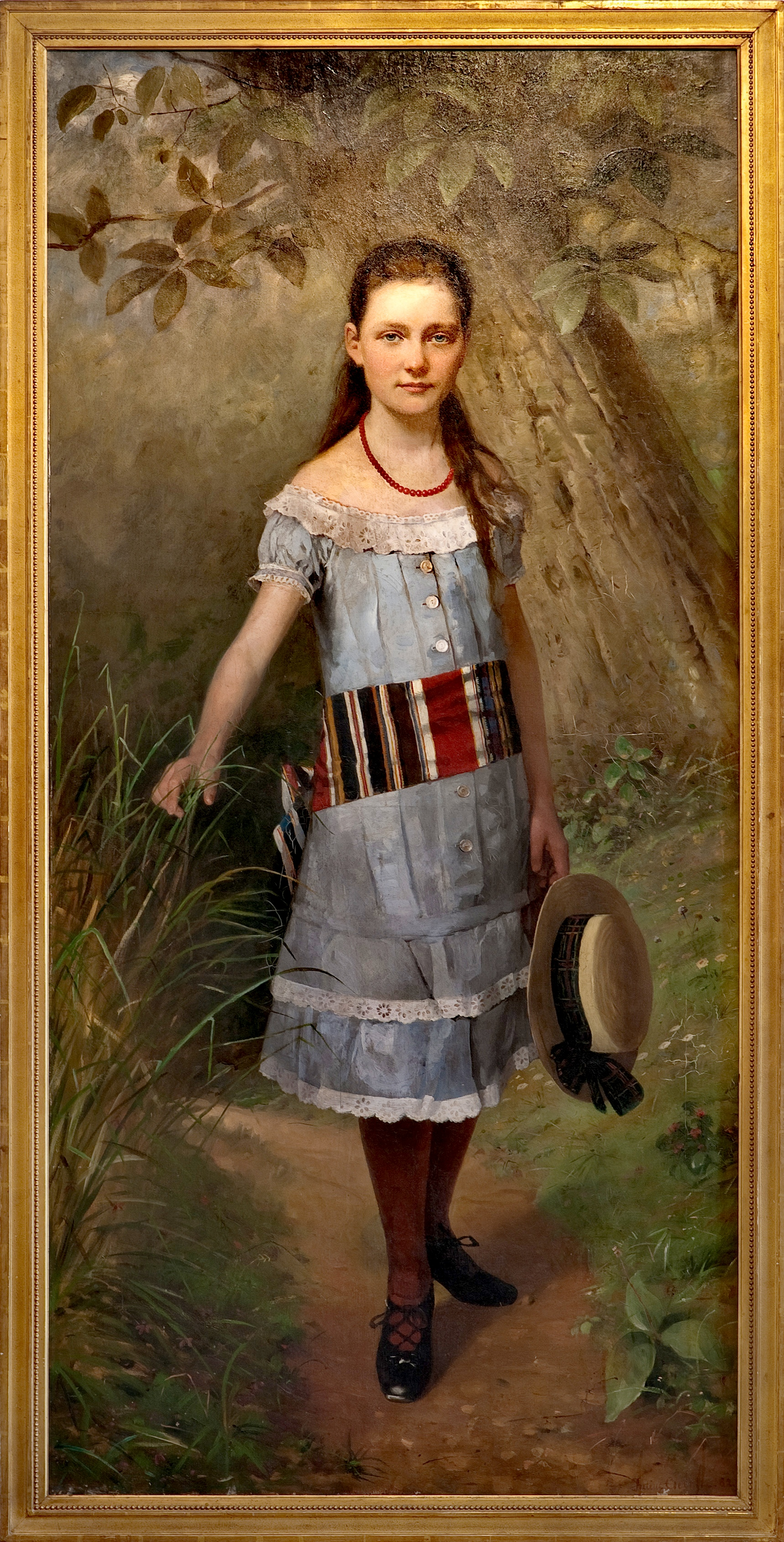 Porträtbild von Helene Kaemmerer als Kind. Dieses Porträit spiegelt die damalige Auffassung des Einklanges von Kind und Natur. Fotografiert im Museum für Hamburgische Geschichte, Hamburg, Deutschland.